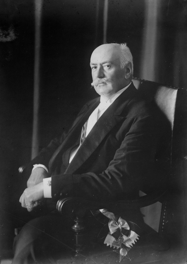 Juan Luis Sanfuentes Andonaegui (Santiago, 27 de diciembre de 1858-ibídem, 16 de julio de 19301​) fue un abogado y político chileno, Presidente de la República en el periodo 1915 a 1920.